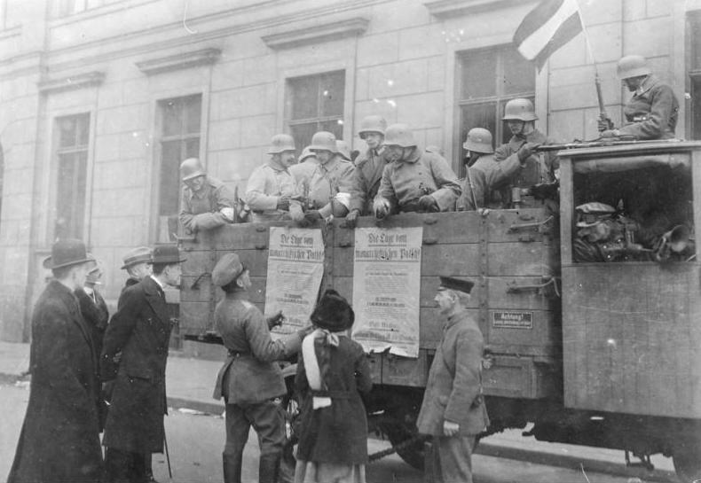 Kapp-Putsch